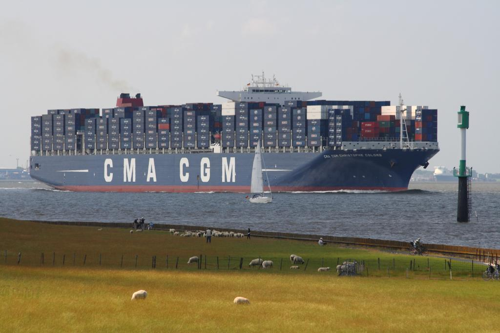 CMA CGM Christophe Colomb (13.880 TEU) tideabhängig in die Elbe einlaufend bei Glameyer Stack am 13. Juli 2010 Tiefgang 12,70 m in Frischwasser